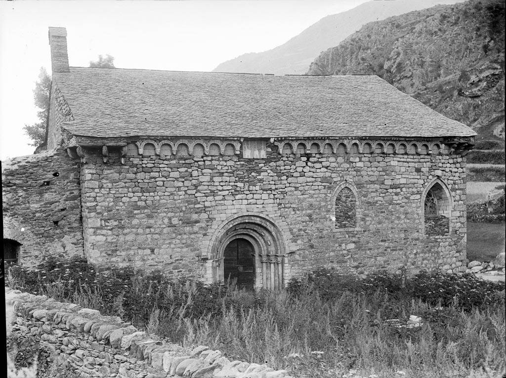 Imatge